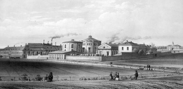 Gaswerk Fünfhaus, vom Norden her; Heutiges Westbahnhofgelände